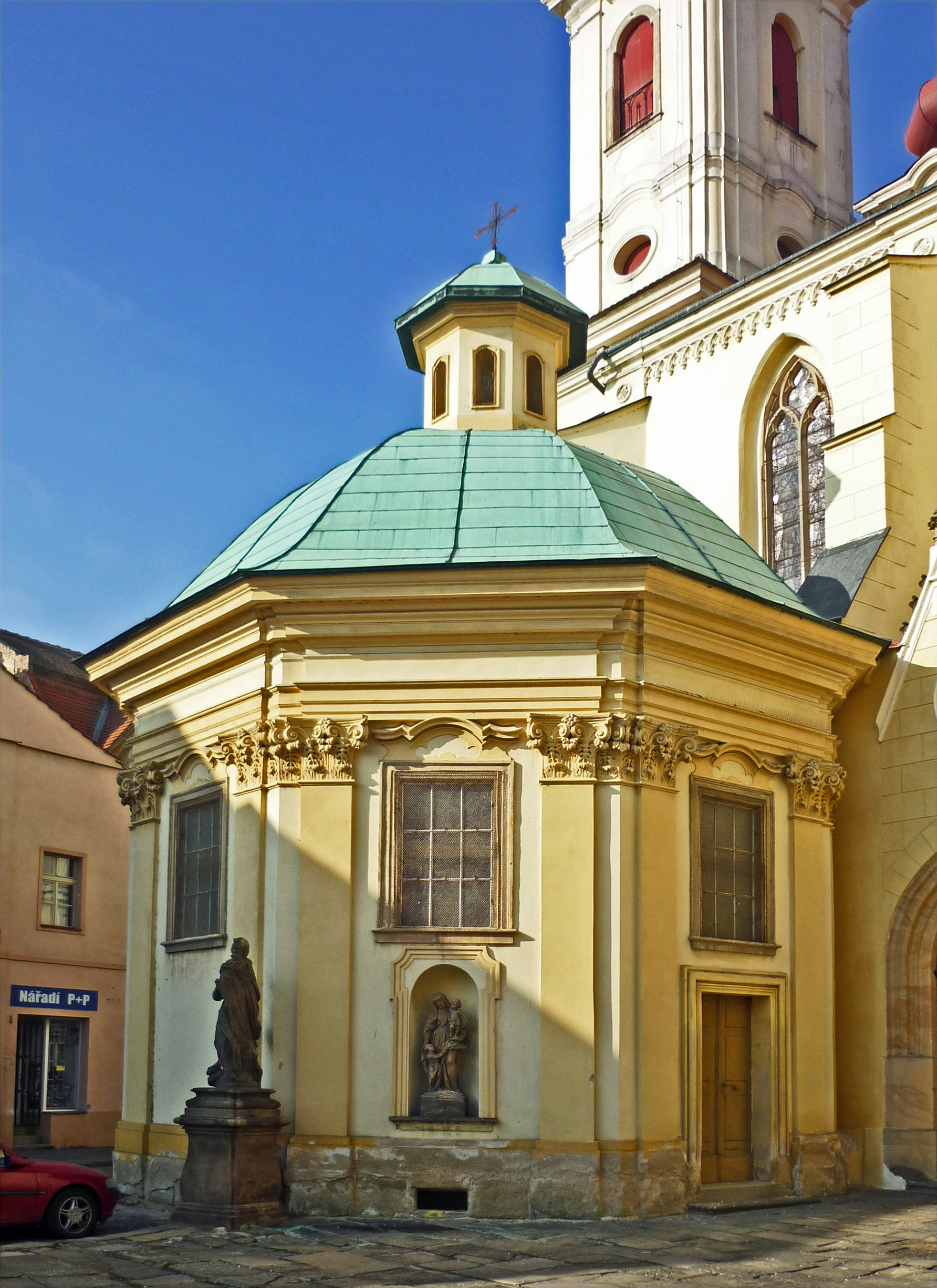 St. Nepomuk-Kapelle an der Dekanatskirche Mariä Himmelfahrt in Saaz/Žatec mit der Skulptur Anna selbdritt